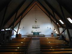 Innenraum der Apostelkirche